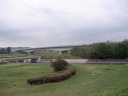 多摩川にかかる東京都道9号川崎府中線・稲城大橋有料道路の橋梁。右が東京都府中市、左が稲城市。